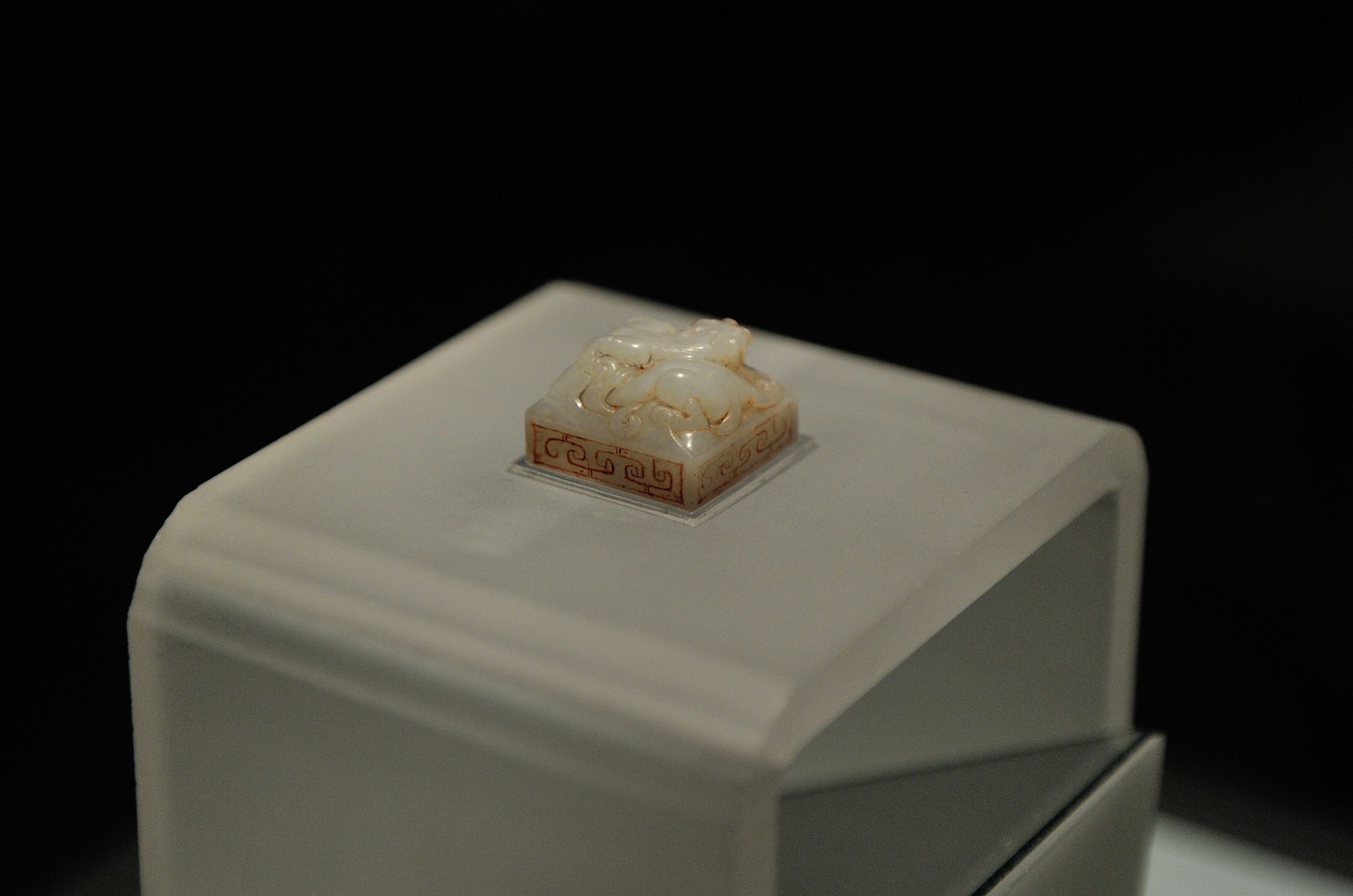 “皇后之玺”玉印上部